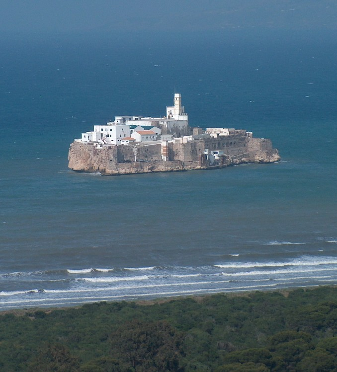 El Peñón de Alhucemas, Islote de soberanía española en el norte de África